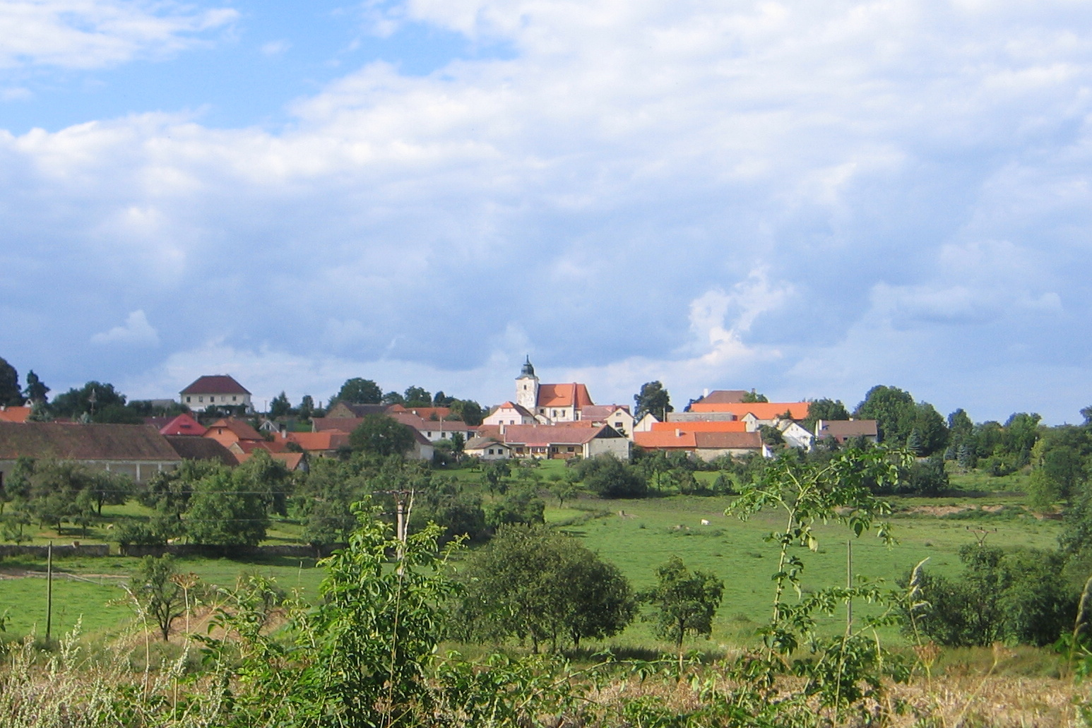 Bukovník (okr. Klatovy), kostel sv. Václava a ves od jihu.